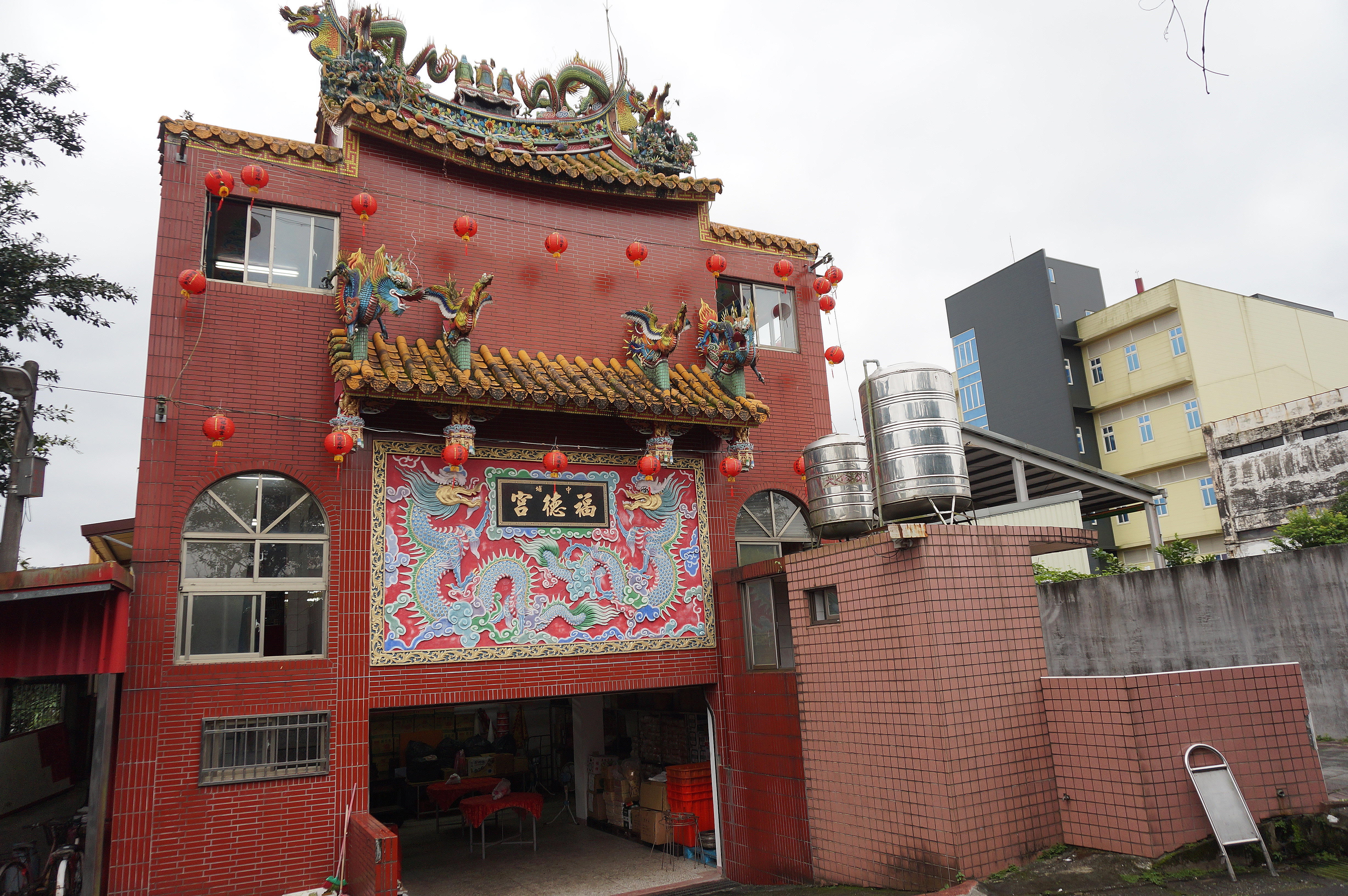 中文（台灣）: 百福中埔福德宮後方外觀。